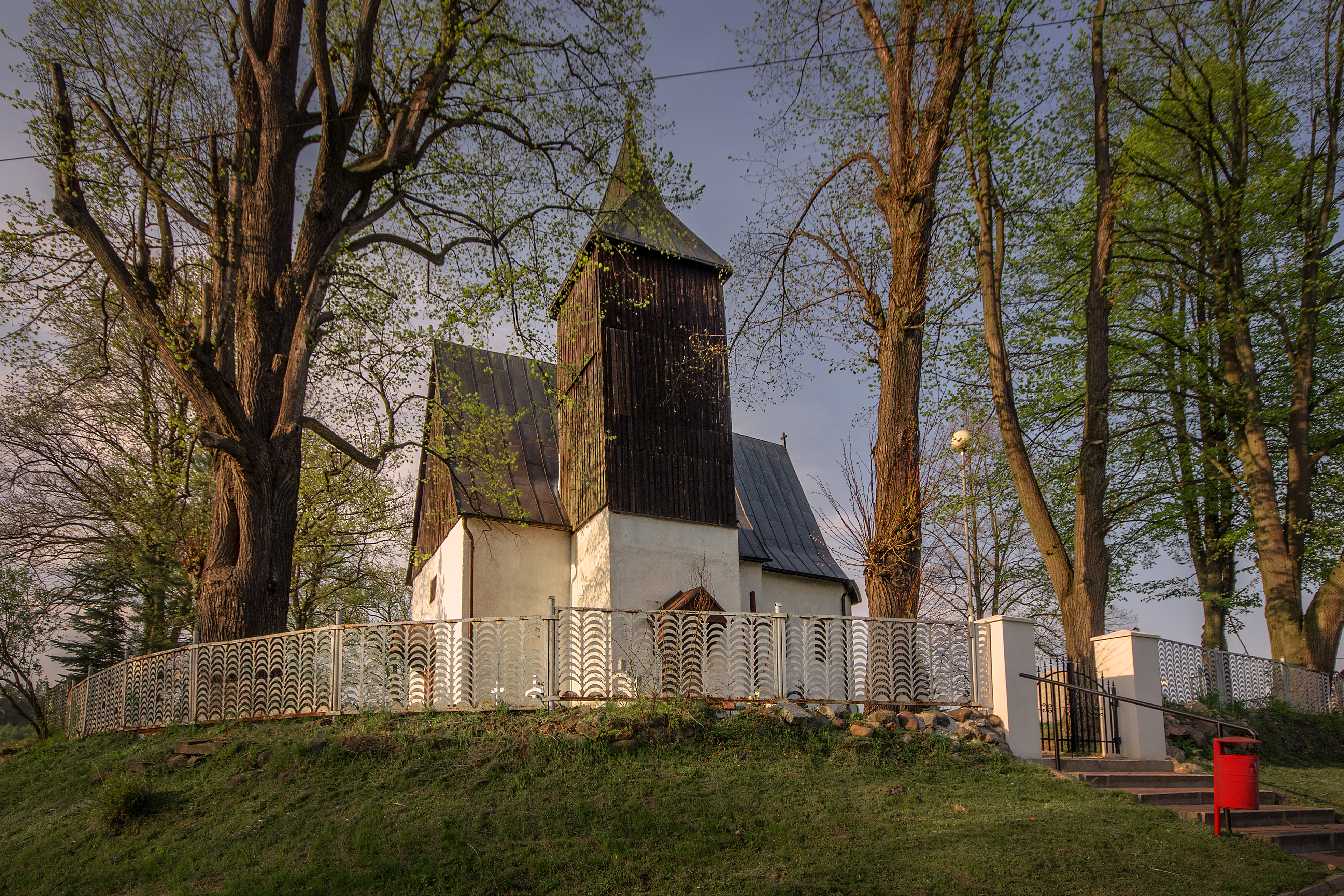 Żelazny Most, kościół fil. p.w. św. Barbary, XVI